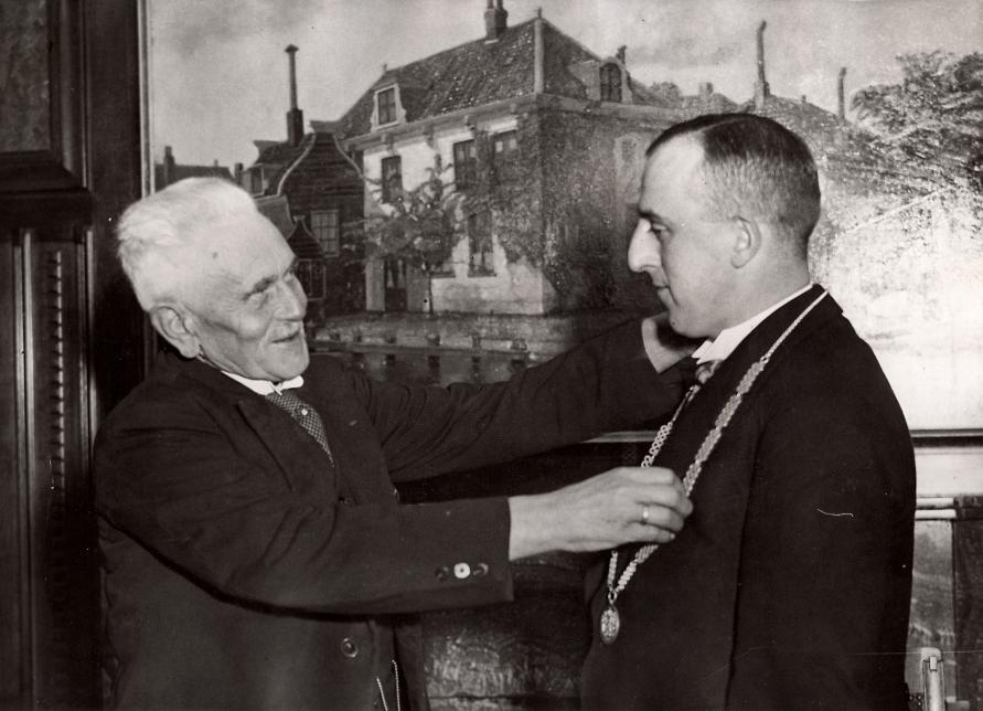 De installatie van de jongste burgemeester van Boskoop, Mr. E.P. Verkerk. Nederland 1 december 1933. De versierselen worden omgehangen door de loco-burgemeester en wethouder E. Guldemond.